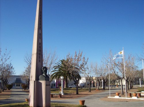 Plaza de Casupá Uruguay